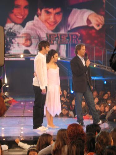 Fernando Dente y Sofía Agüero Petros en el Segundo Concierto de High School Musical: La selección